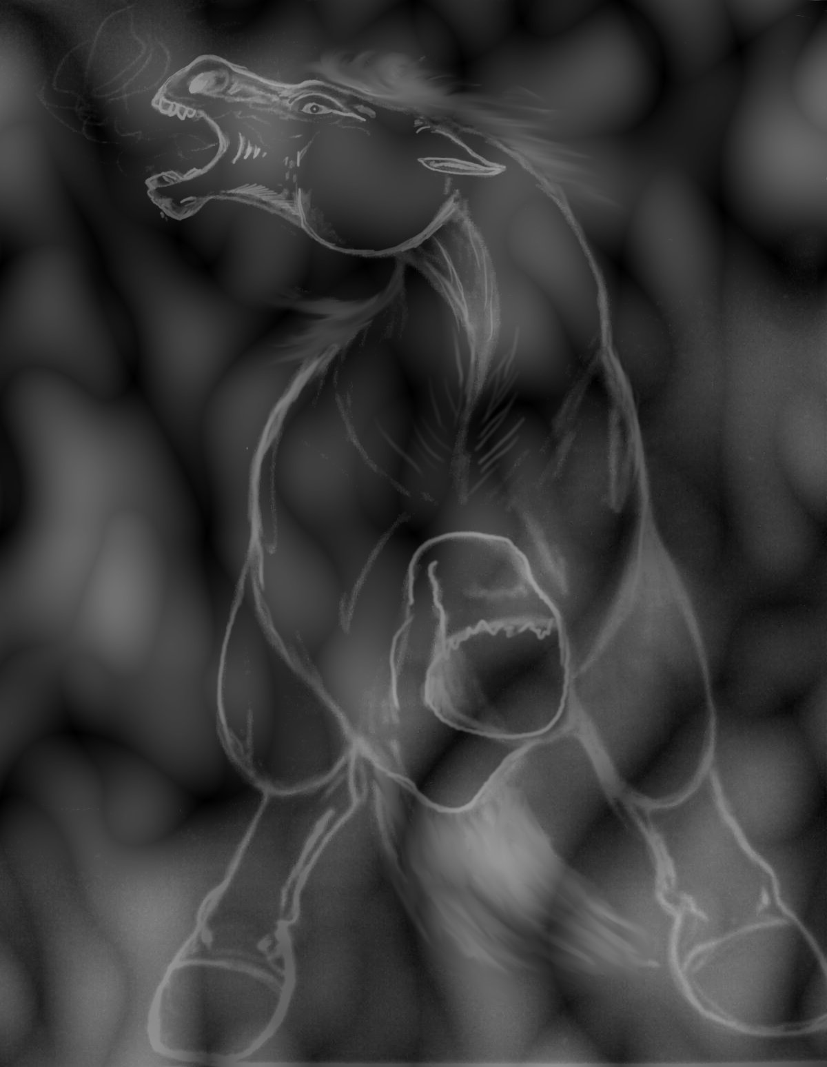 Un Helhest, photographie d'un dessin au crayon réalisé en 2009 et retouché sous GIMP